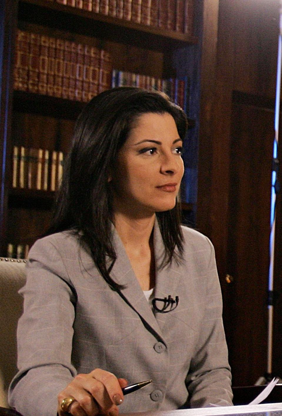 A jornalista brasileira Ana Paula Padrão